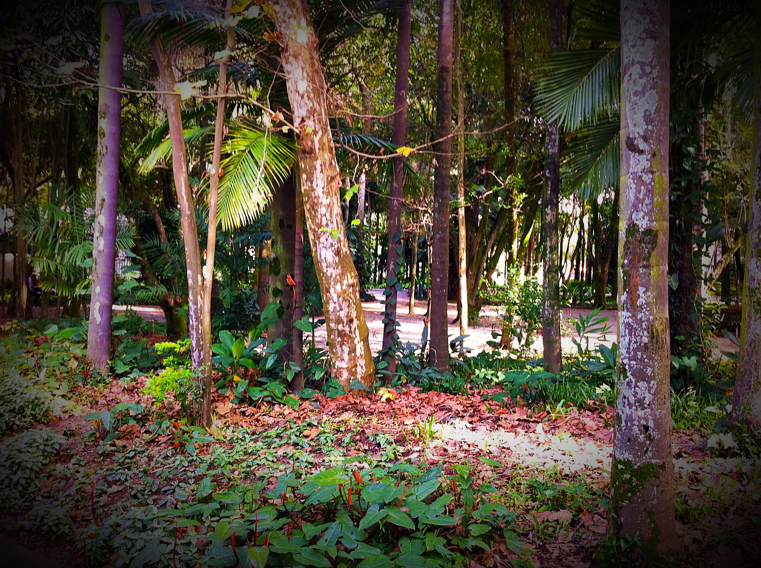 Um entardecer no parque Celso Daniel em Santo André - SP